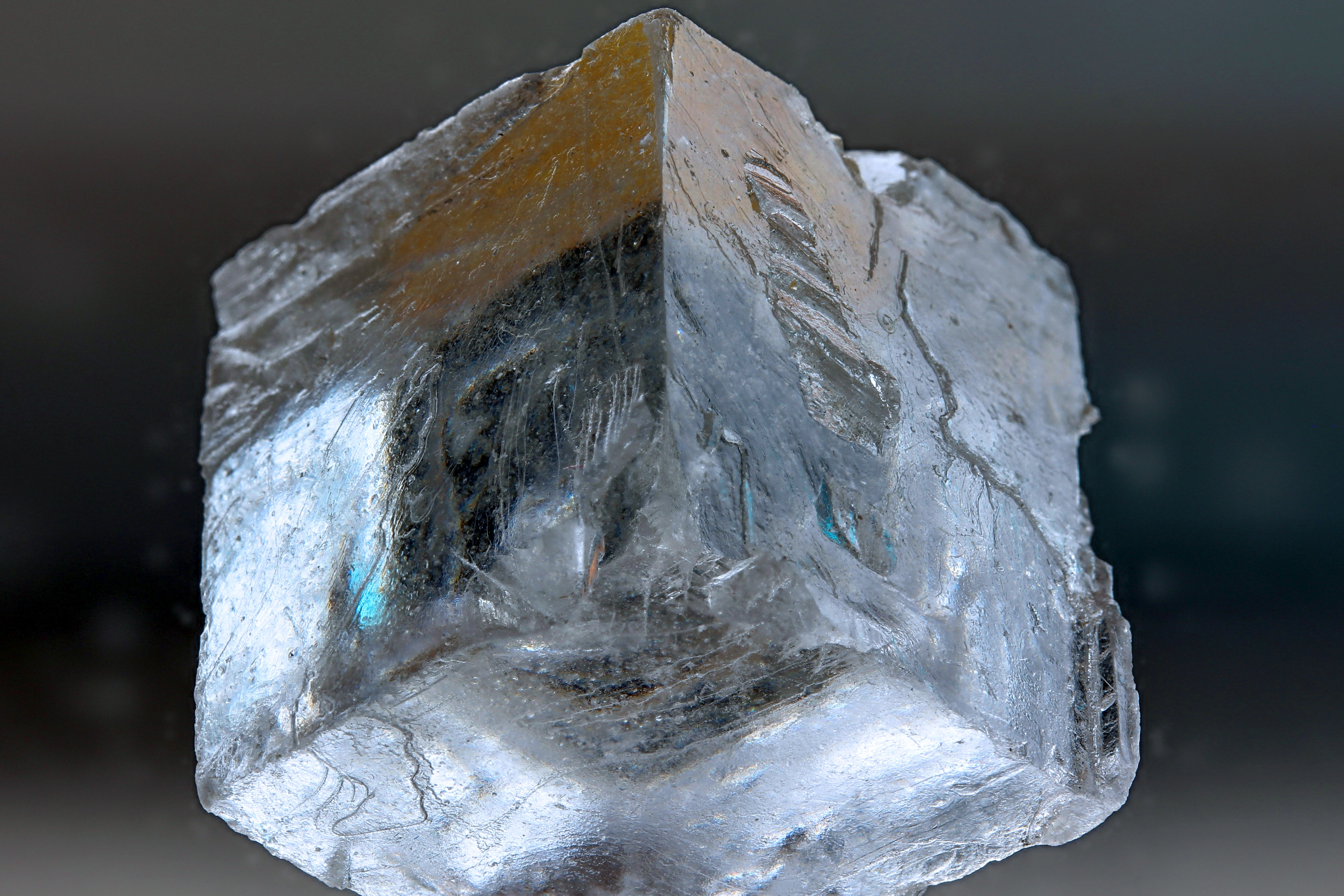 Makroaufnahme eines Halit-Würfels (Natriumchlorid, NaCl)